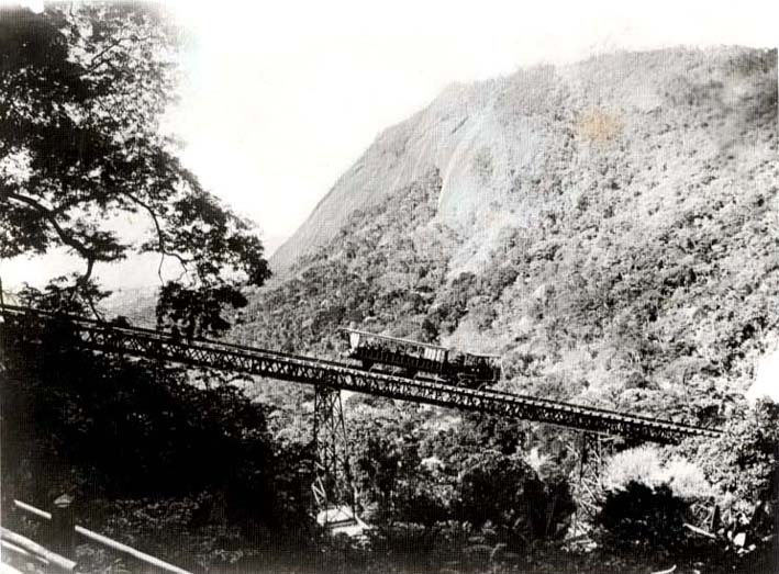 Viaduto do Silvestre da Estrada de Ferro do Corcovado (Rio de Janeiro/Brasil)